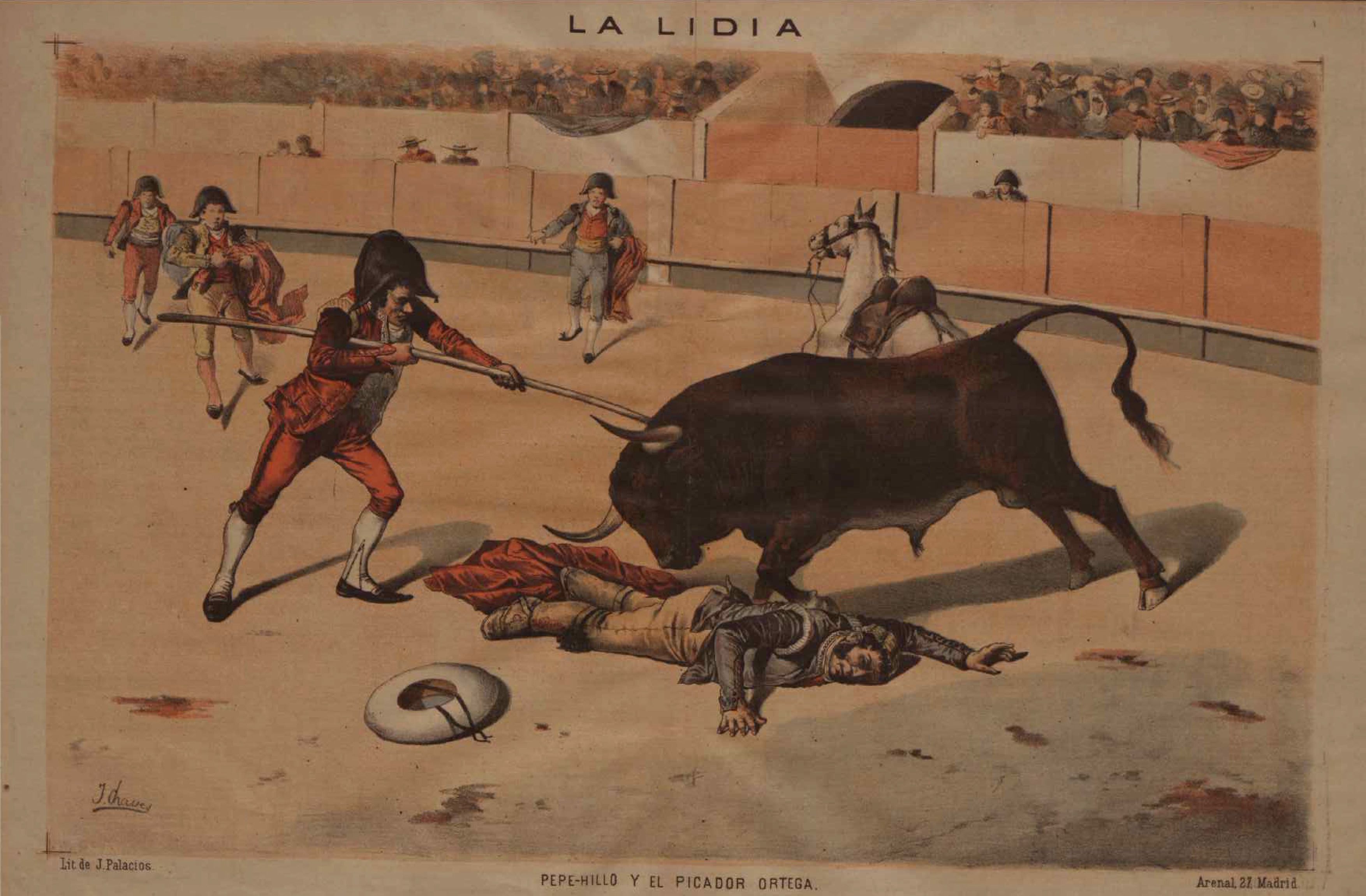 Lámina realizada por el pintor sevillano Jose María Chávez Ortiz